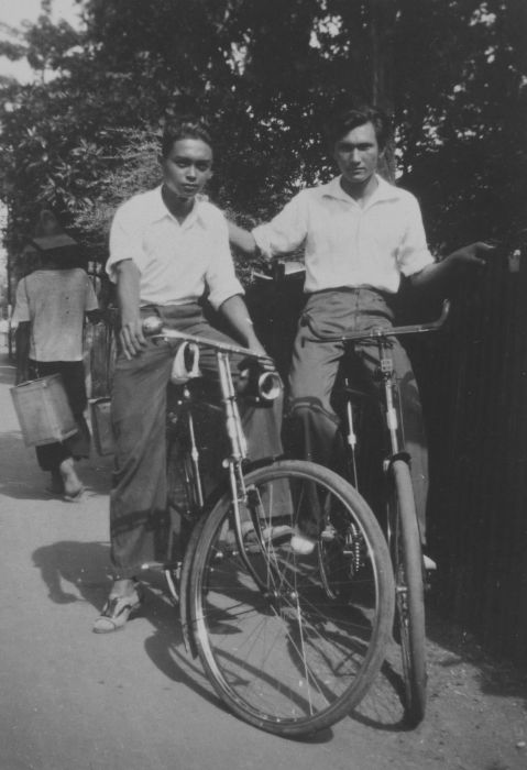 foto. Portret van de Indo-Europeaan Python Wijnhamer en Britt met fiets